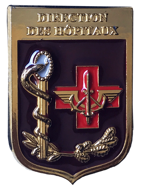 Insigne de la Direction des hôpitaux (DHOP) du Service de santé des armées.